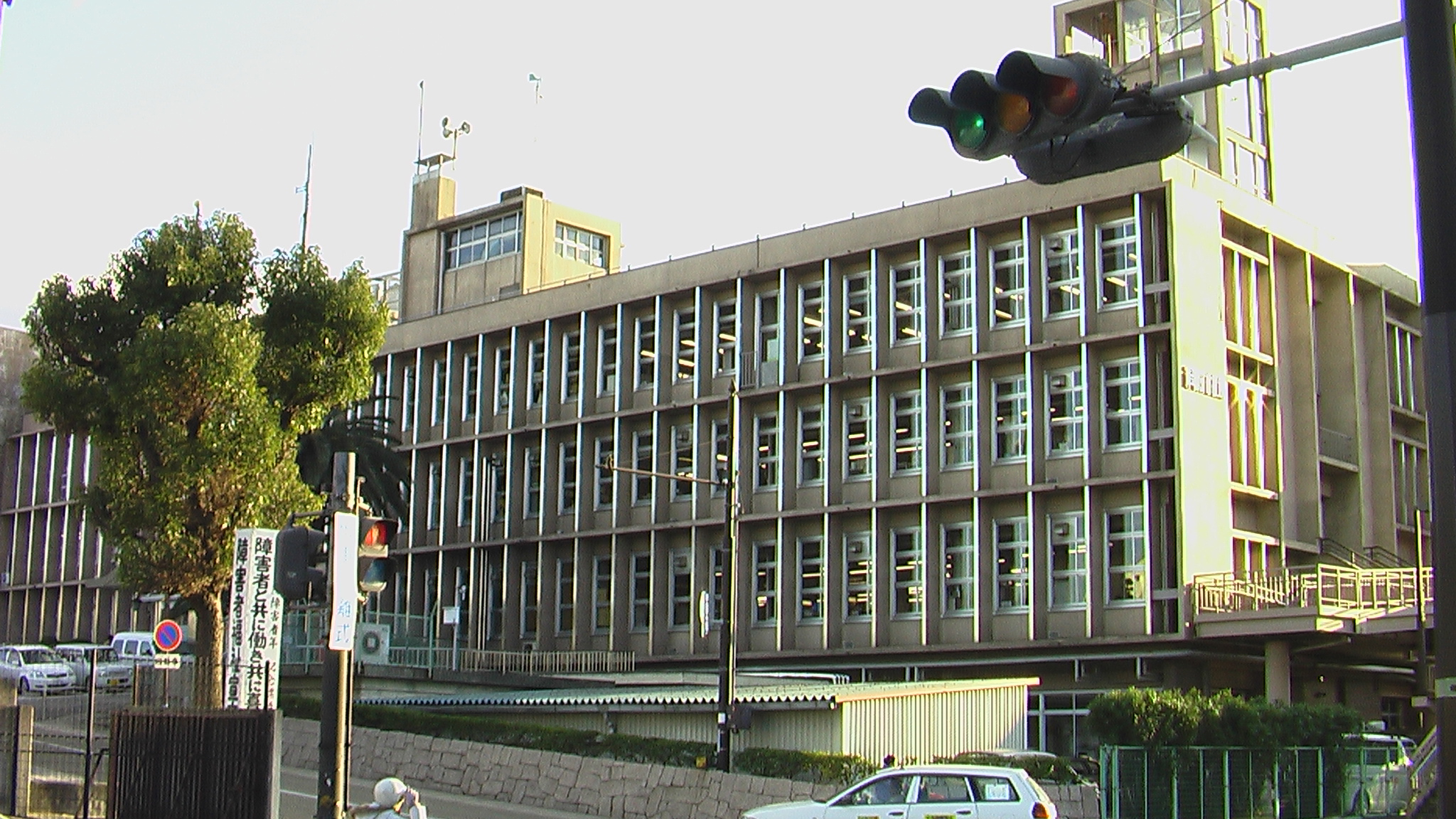 Kishiwada City Hall in Osaka-fu, Japan